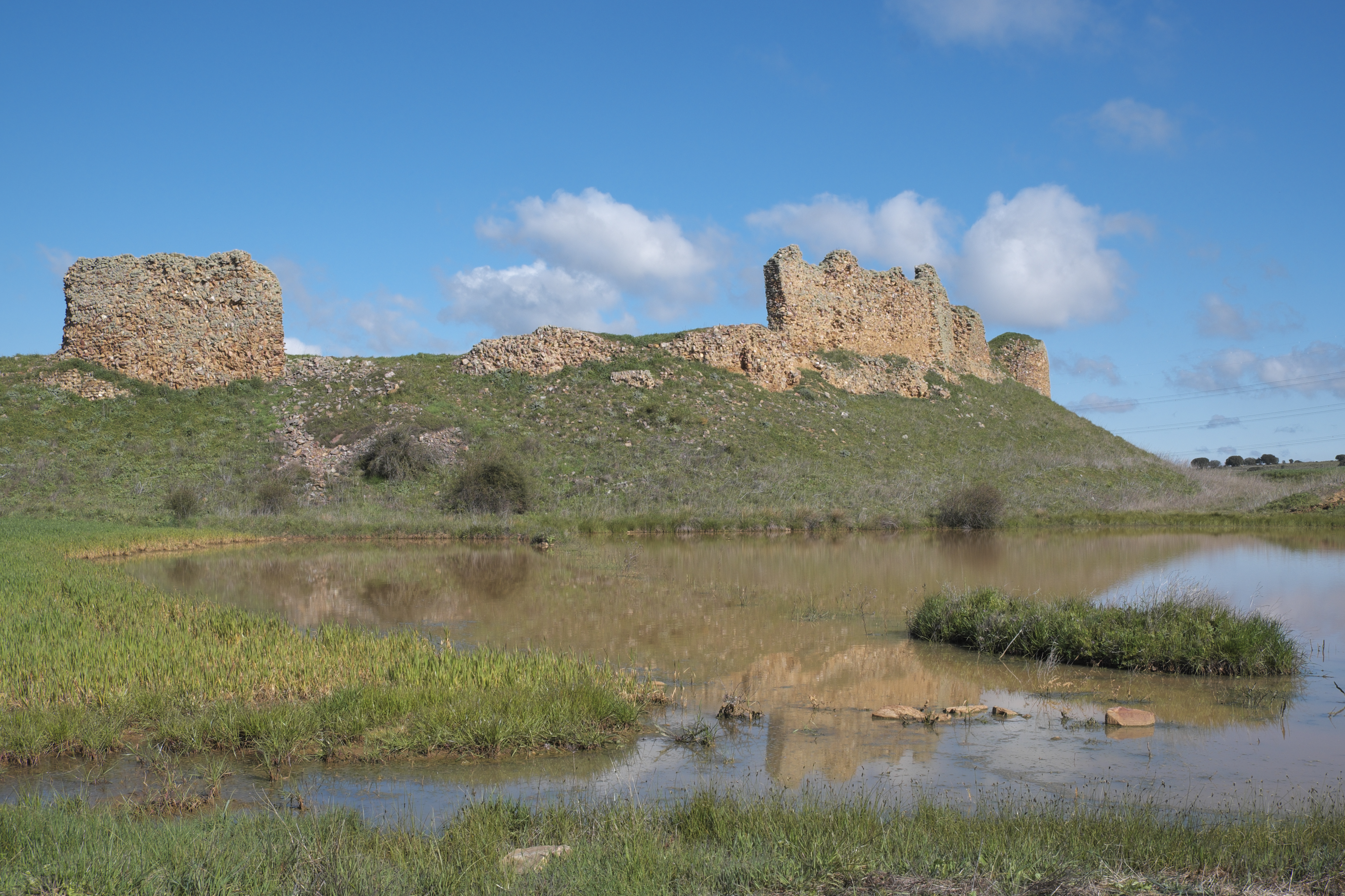 Aufgegebener Ort (despoblado) Castrotorafe in San Cebrián de Castro in der Provinz Zamora (Kastilien-León/Spanien)